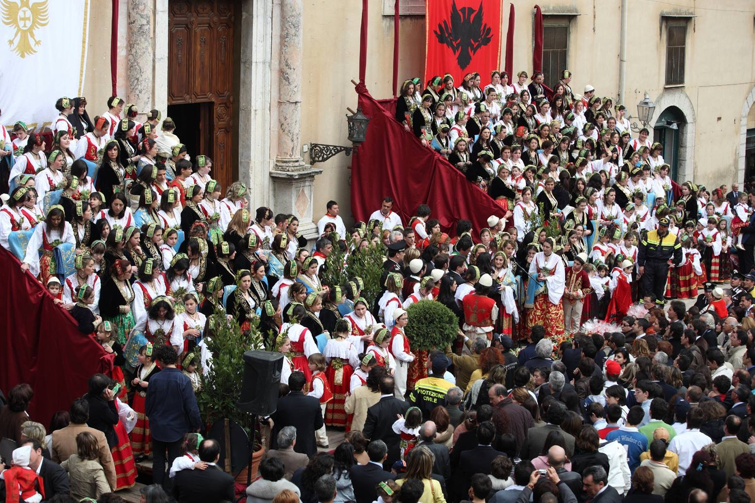 Pasqua 2007 a Piana degli Albanesi.